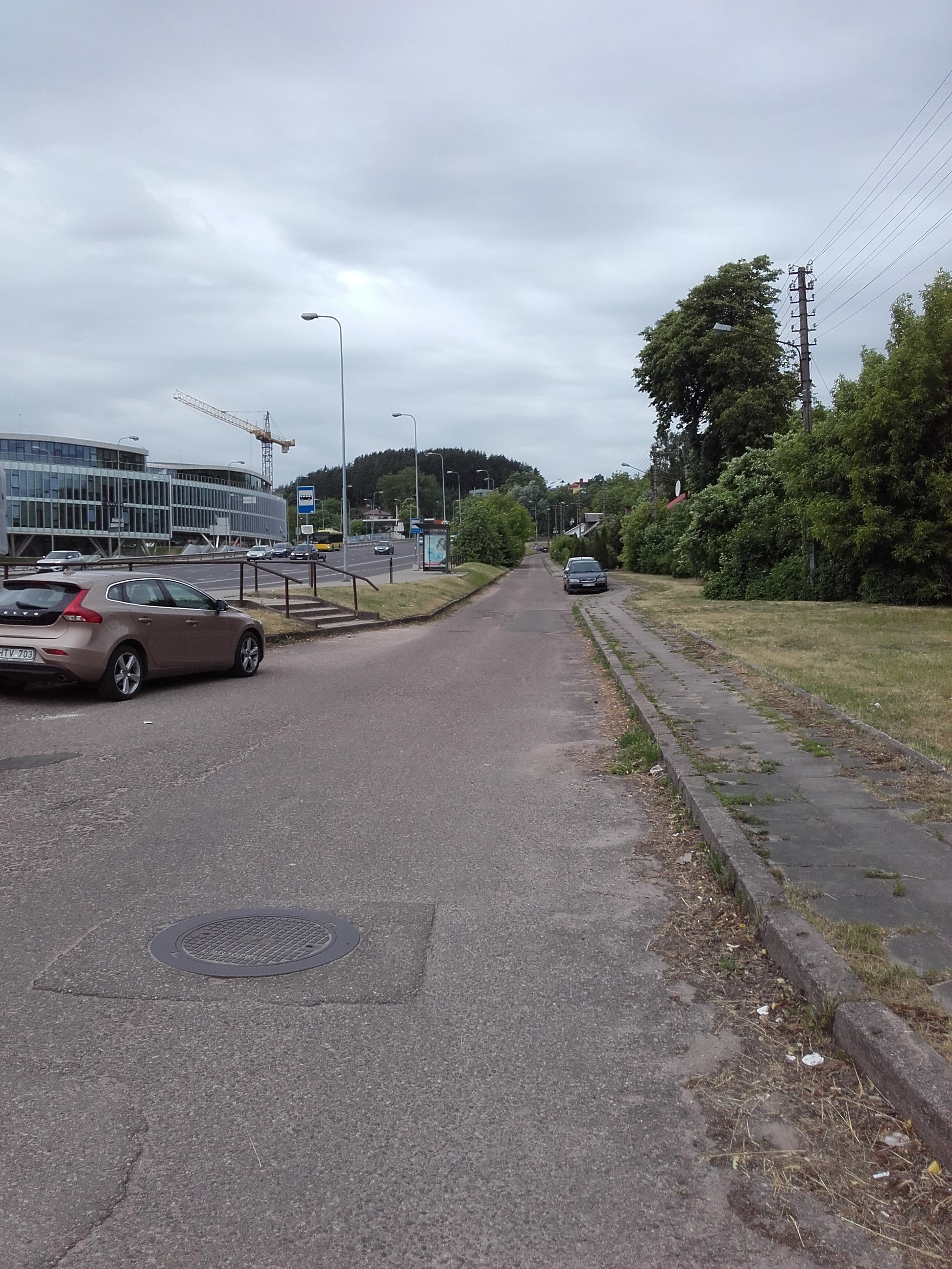 Senoji Ukmergės gatvė